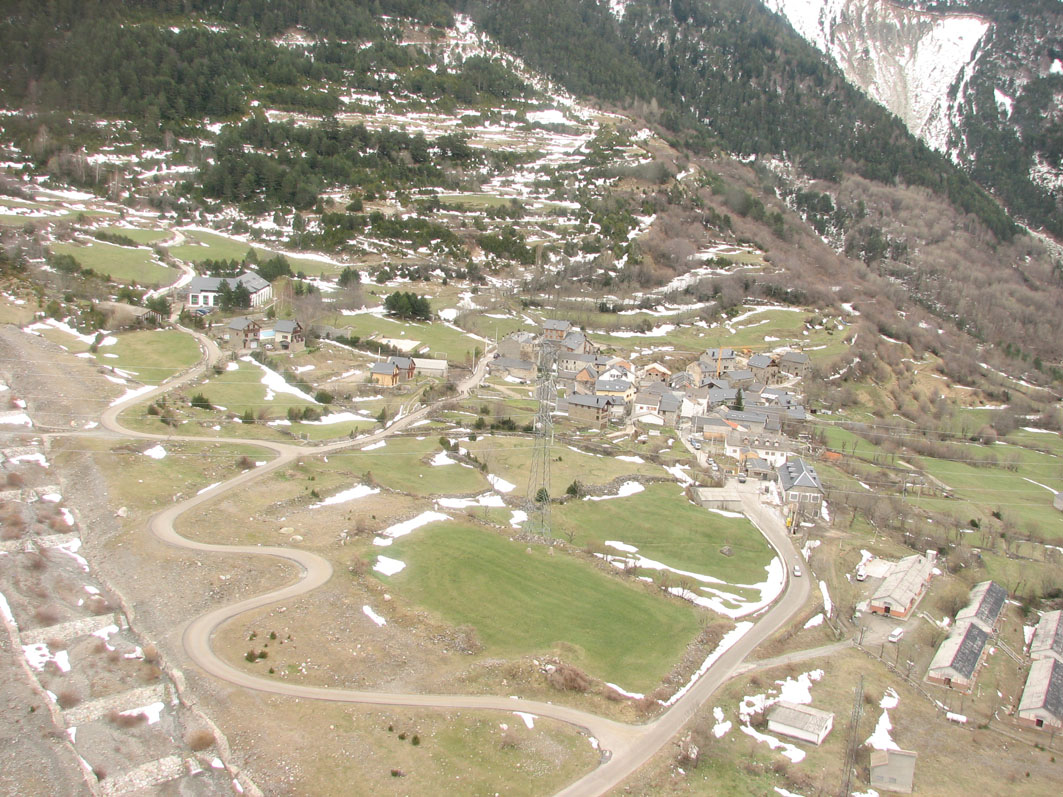 vista aérea del pueblo de Senet de Barrabés